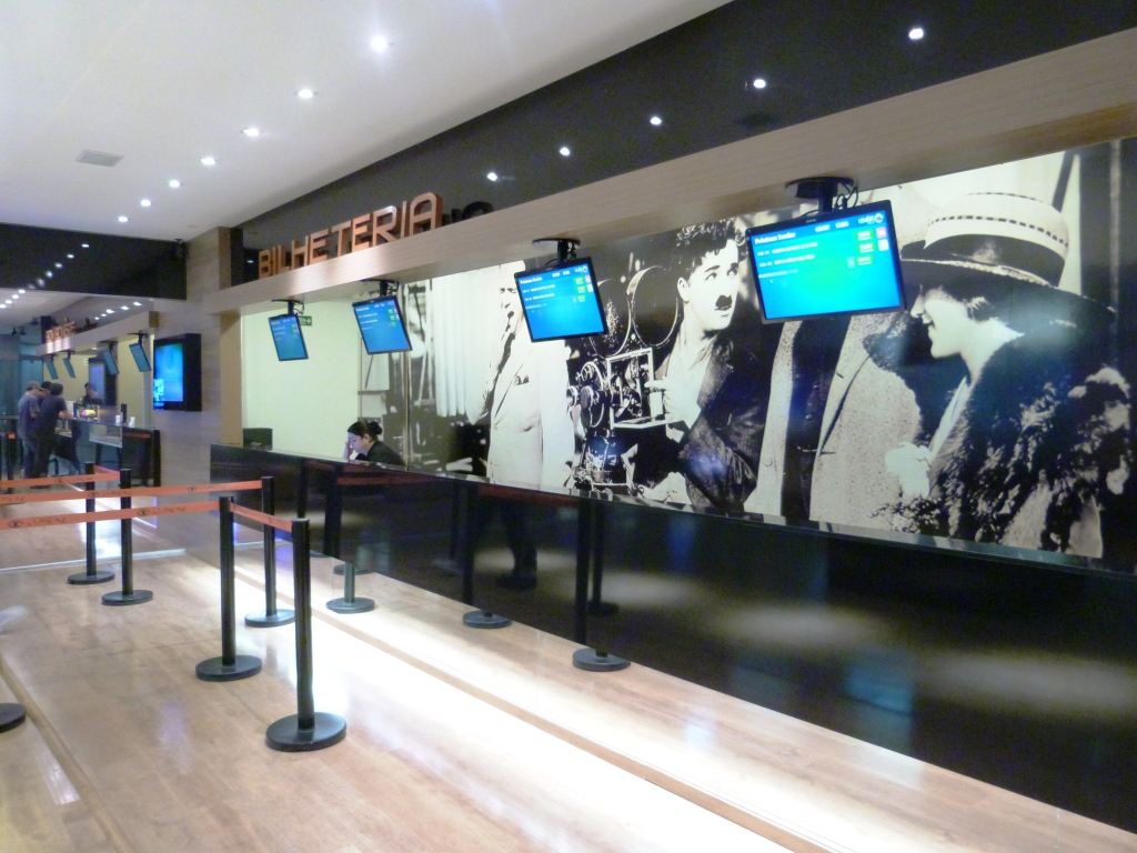 Bilheteria do Lumière Cinemas do Banana Shopping de Goiânia